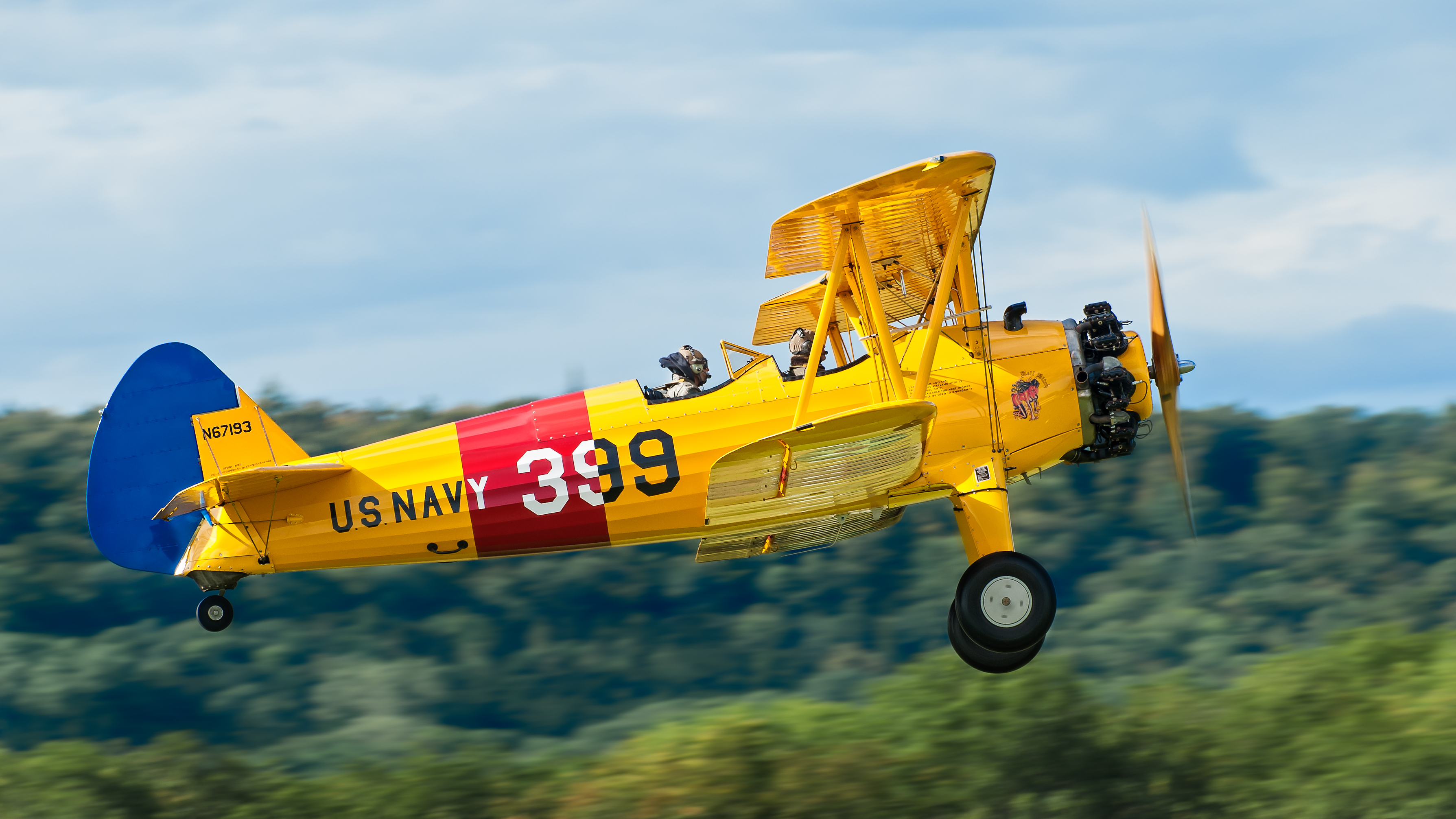 Dieses Foto wurde beim Oldtimer Fliegertreffen, 2013 am Flugfeld Hahnweide bei Kirchheim unter Teck aufgenommen. Es zeigt eine Boeing E75 Stearman beim Start.